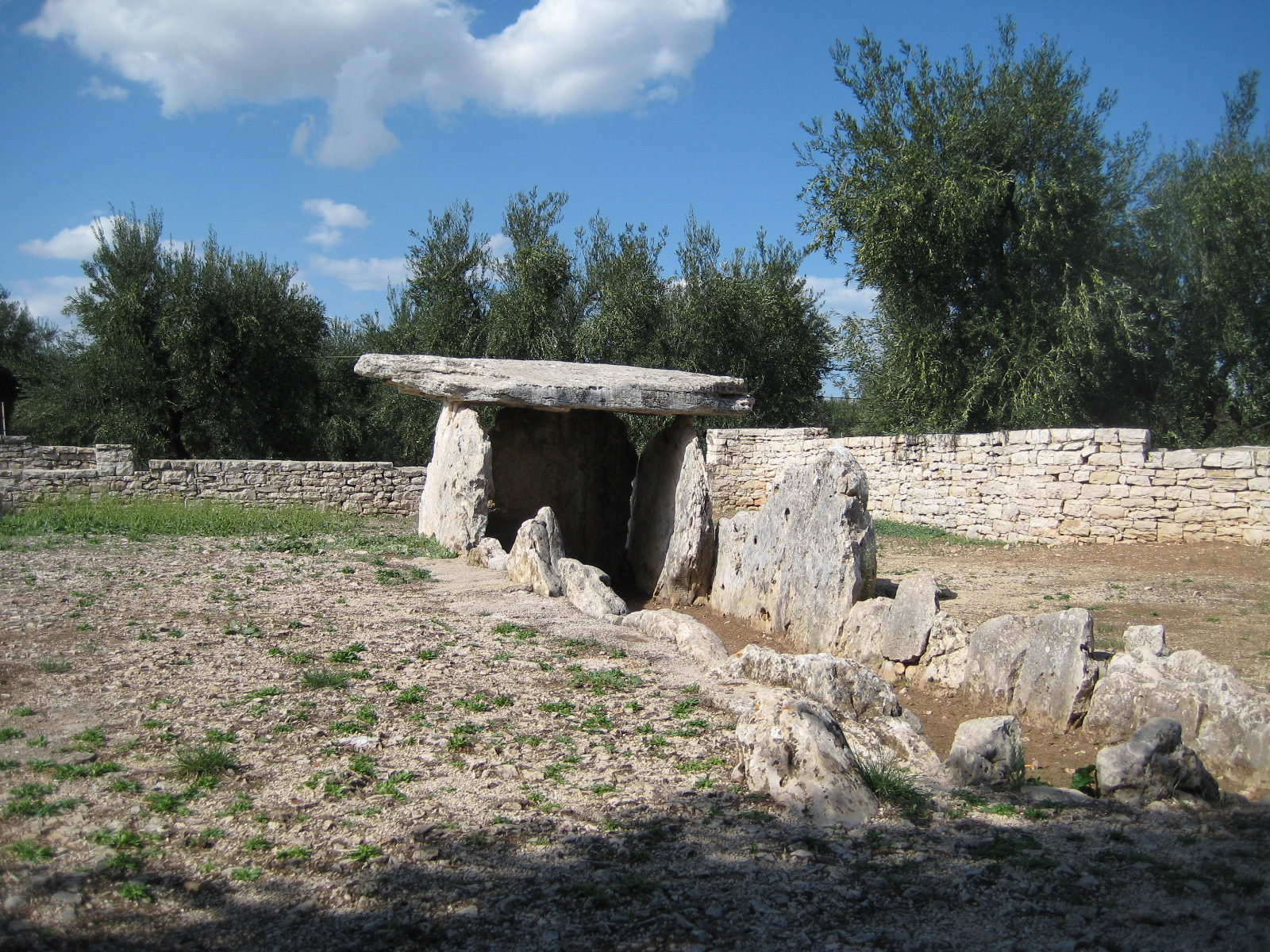 Bisceglie. Il dolmen della Chianca. Prospettiva